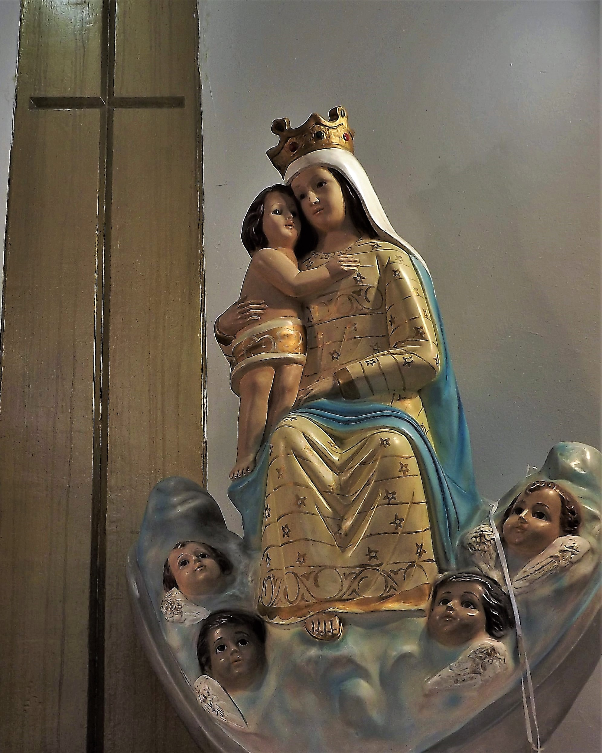 La Virgen de Belén (también llamada Nuestra Señora de Belén) "Patrona del estado Aragua" - Venezuela